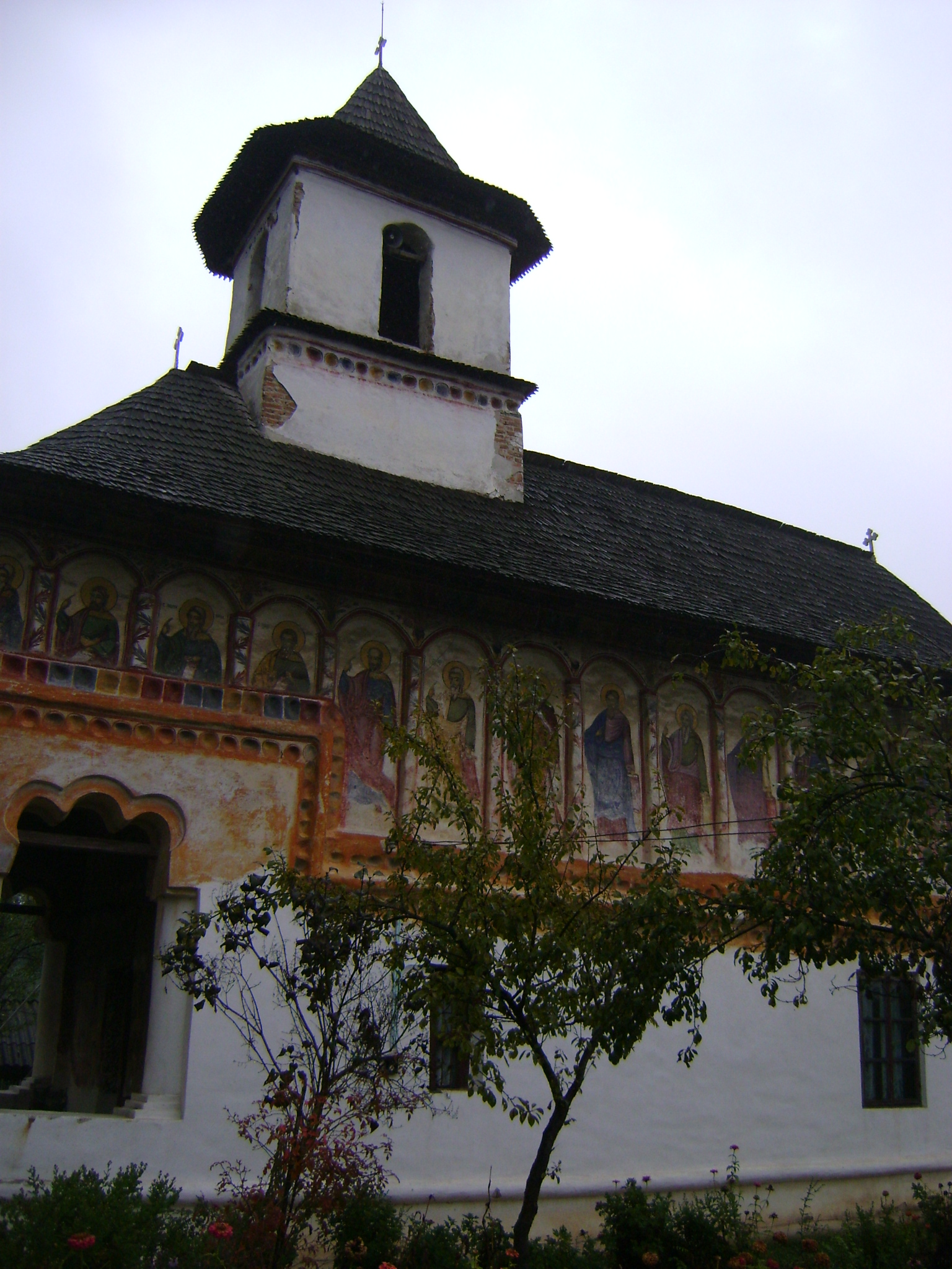 Biserica "Sf. Împărați" și " Sf. Matei"